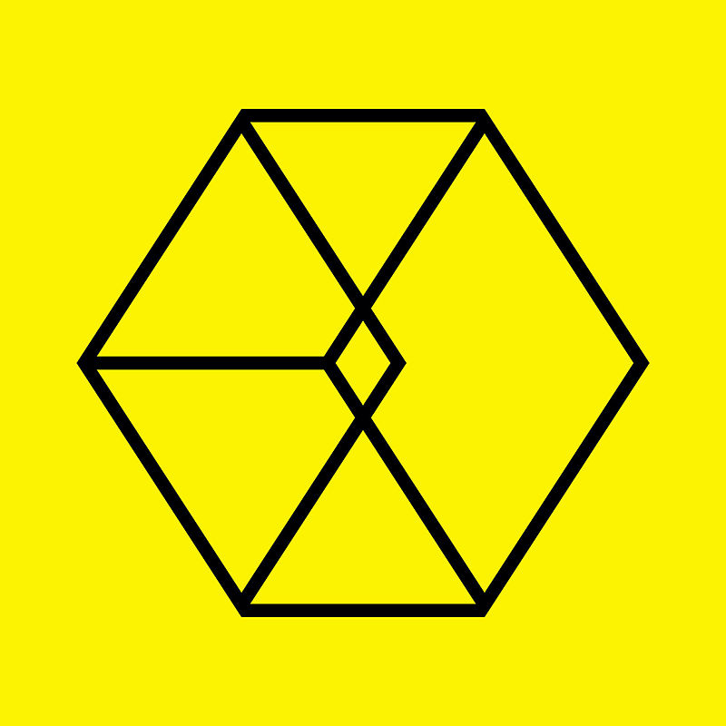 Portada de el álbum reeditado de EXO.